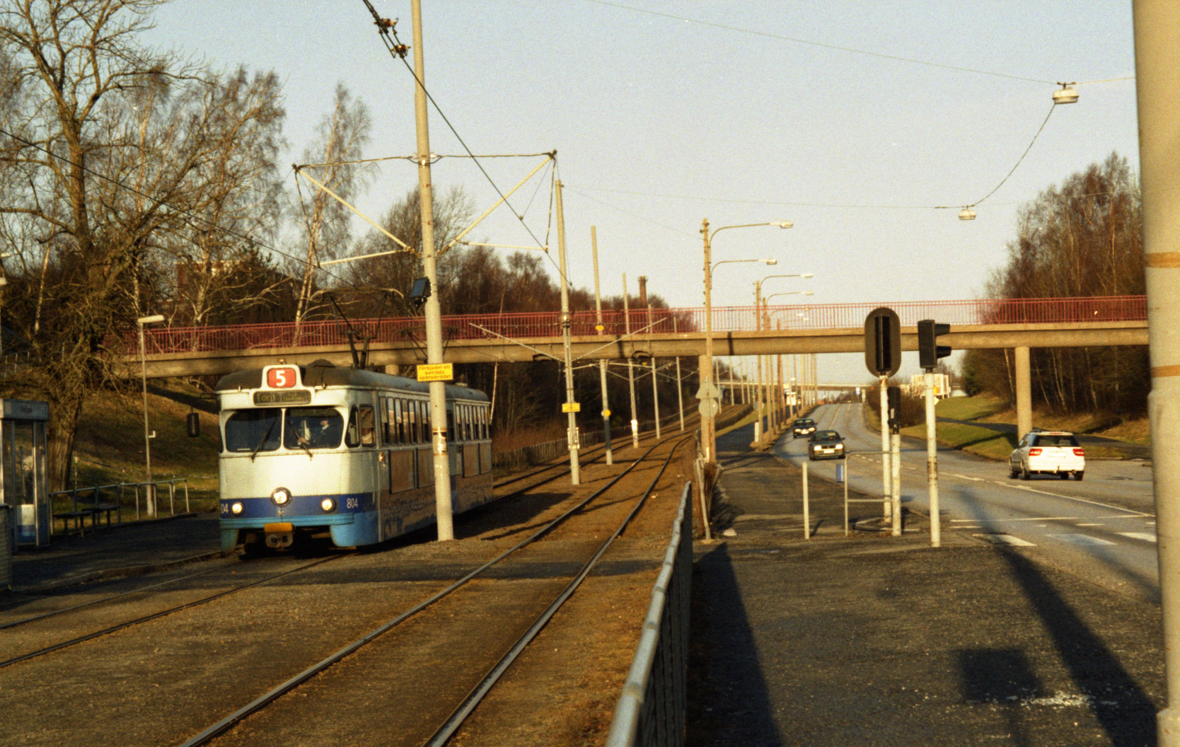 Väderilsgatans spårvagnshållplats. This is a scan from an negative. The date is scan date.